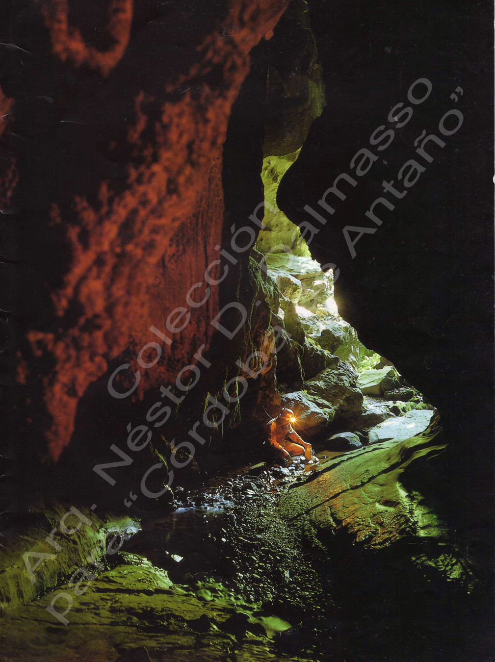 Livio Incatasciato 14 ChapeuMirin-2P